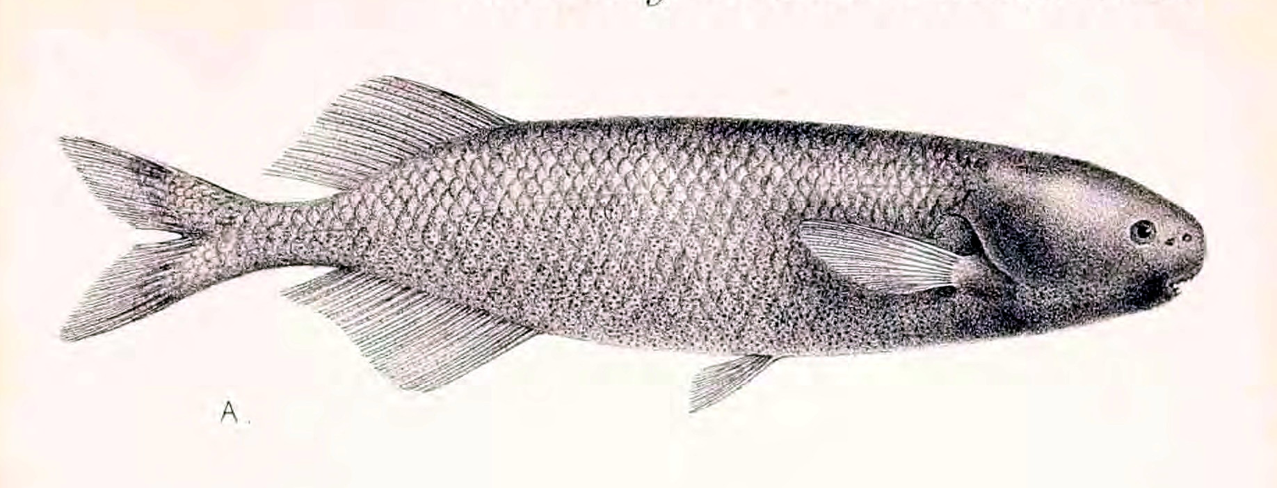 Paramormyrops kingsleyae (Günther 1896) Syn. Brienomyrus kingsleyae